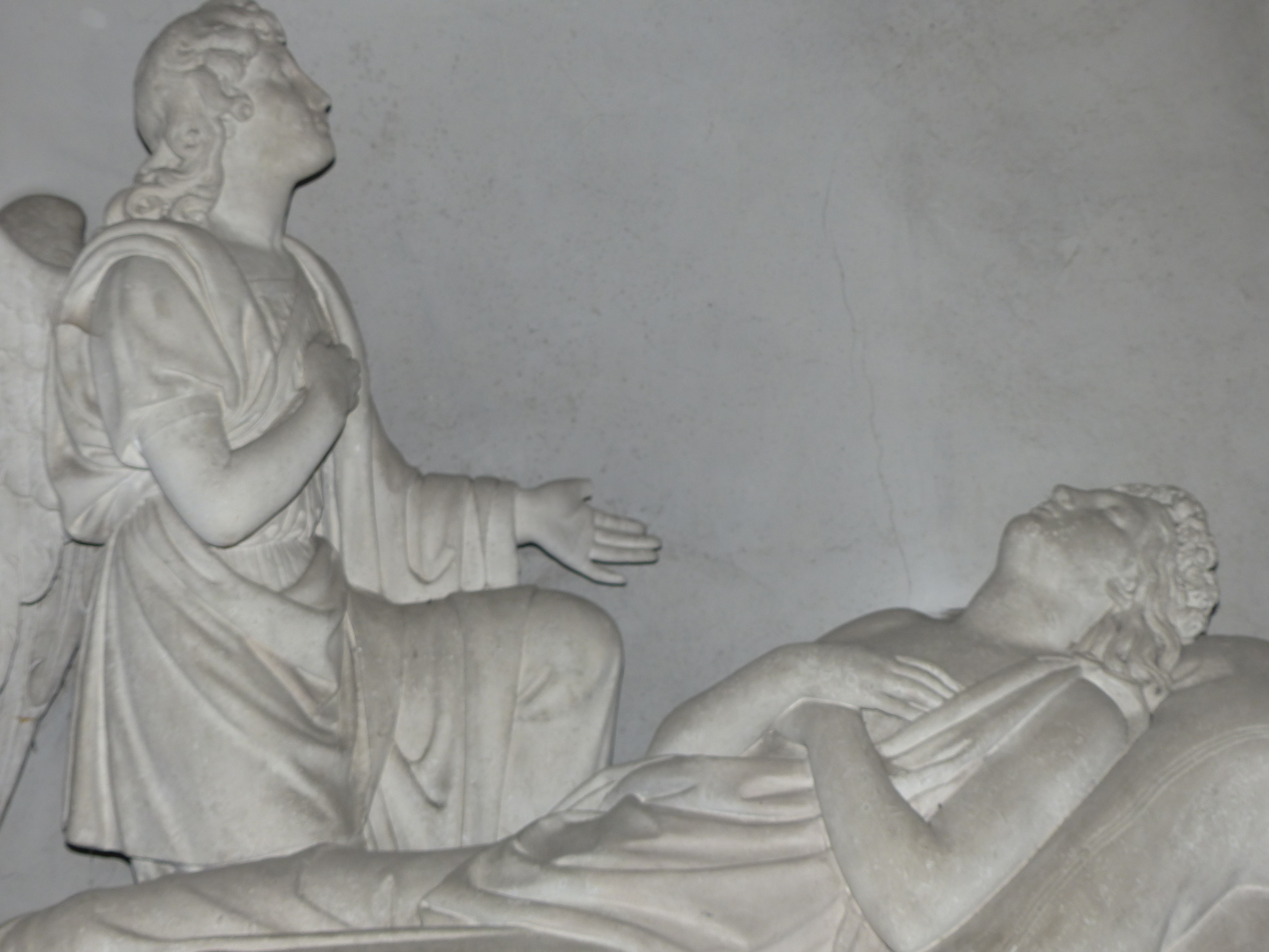 Cénotaphe de Yolande-Louise de Savoie à l'abbaye d'Hautecombe